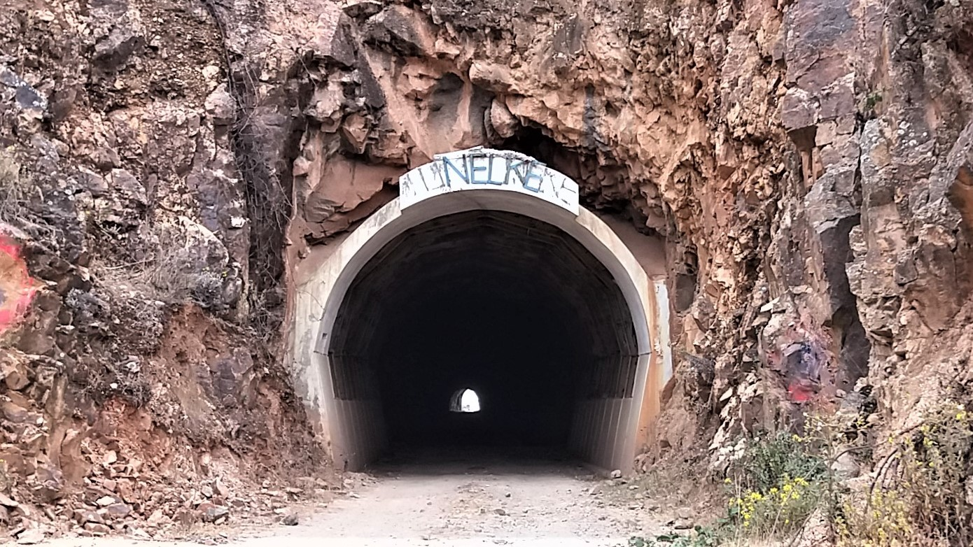 Vista desde el este del túnel Keké que permite ir de Aija a Huarmey vía Succha